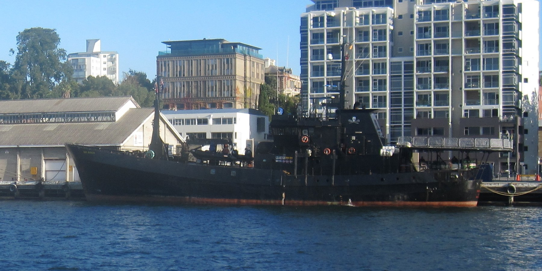 MV Bob Barker